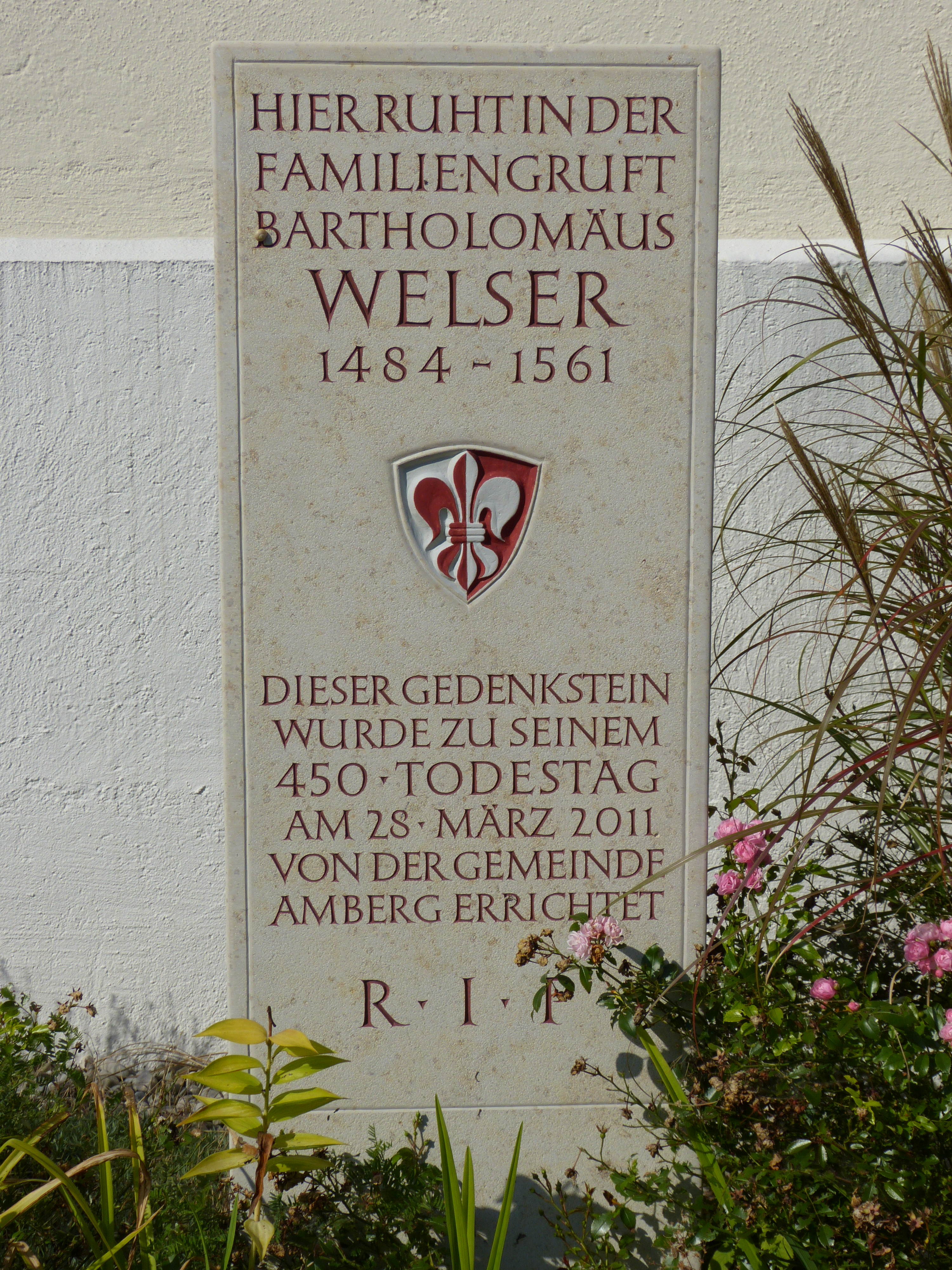 Mariä Heimsuchung in Amberg, Landkreis Unterallgäu, BayernThis is a photograph of an architectural monument.